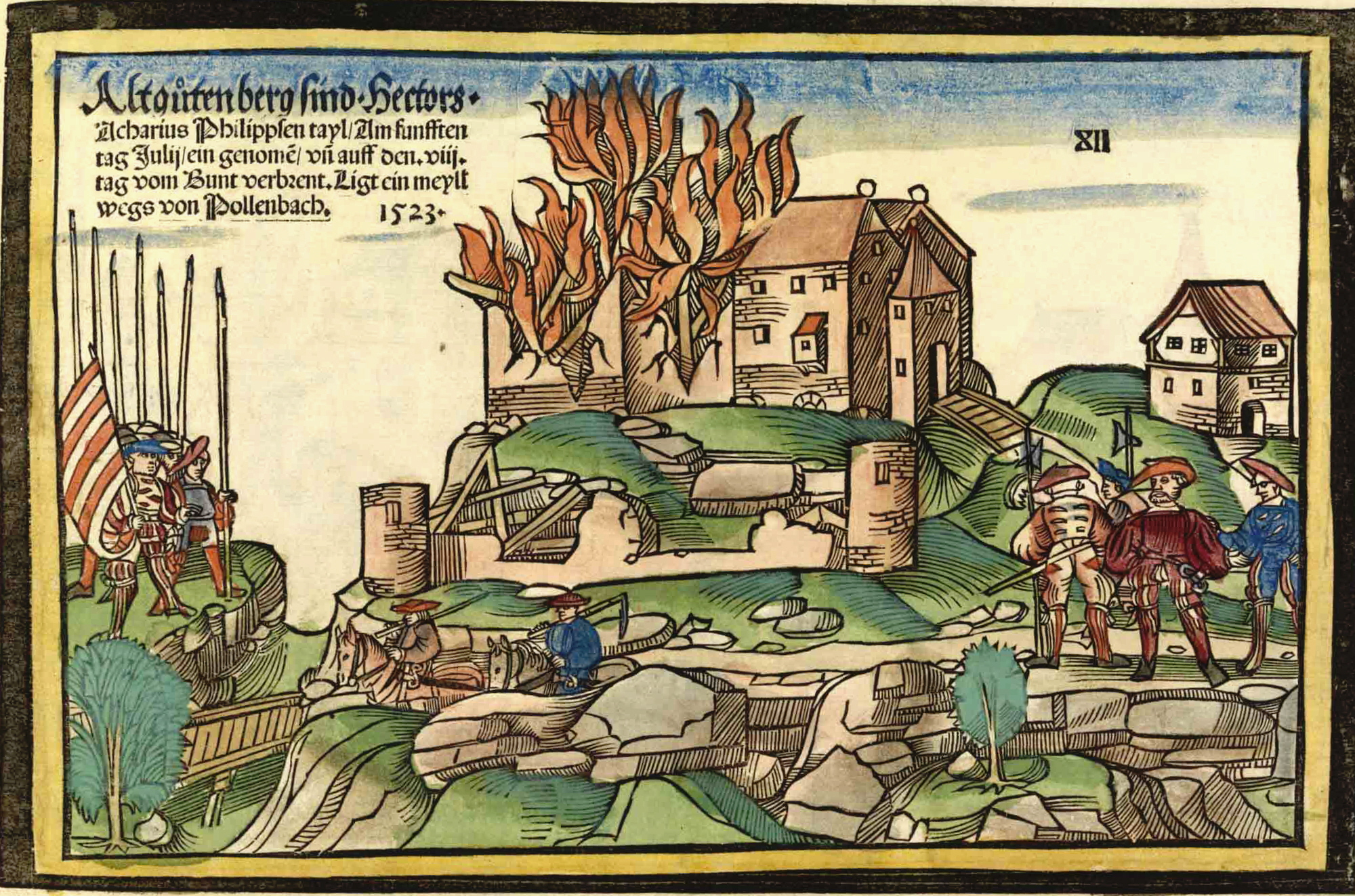 Holzschnitt des Hans Wandereisen: Zerstörung der Burg Altguttenberg durch Truppen des Schwäbischen Bundes.